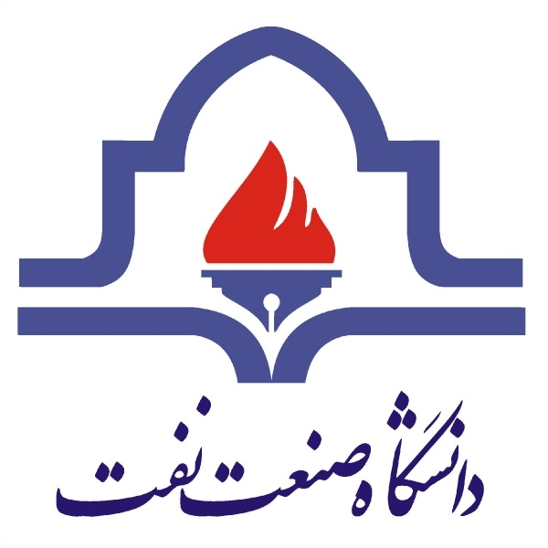 لوگوی دانشگاه صنعت نفت